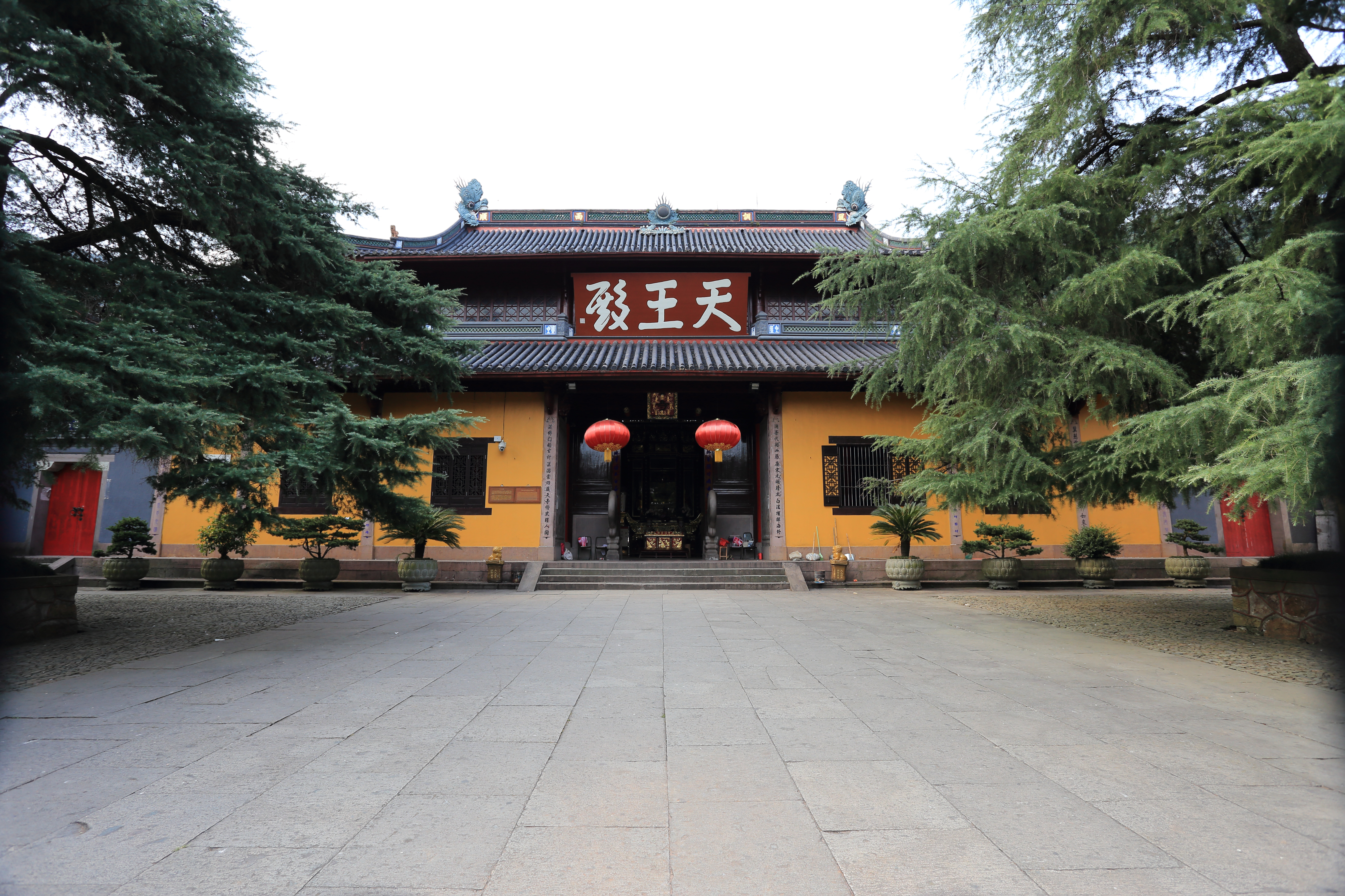 宁波天童寺 —— 天王殿